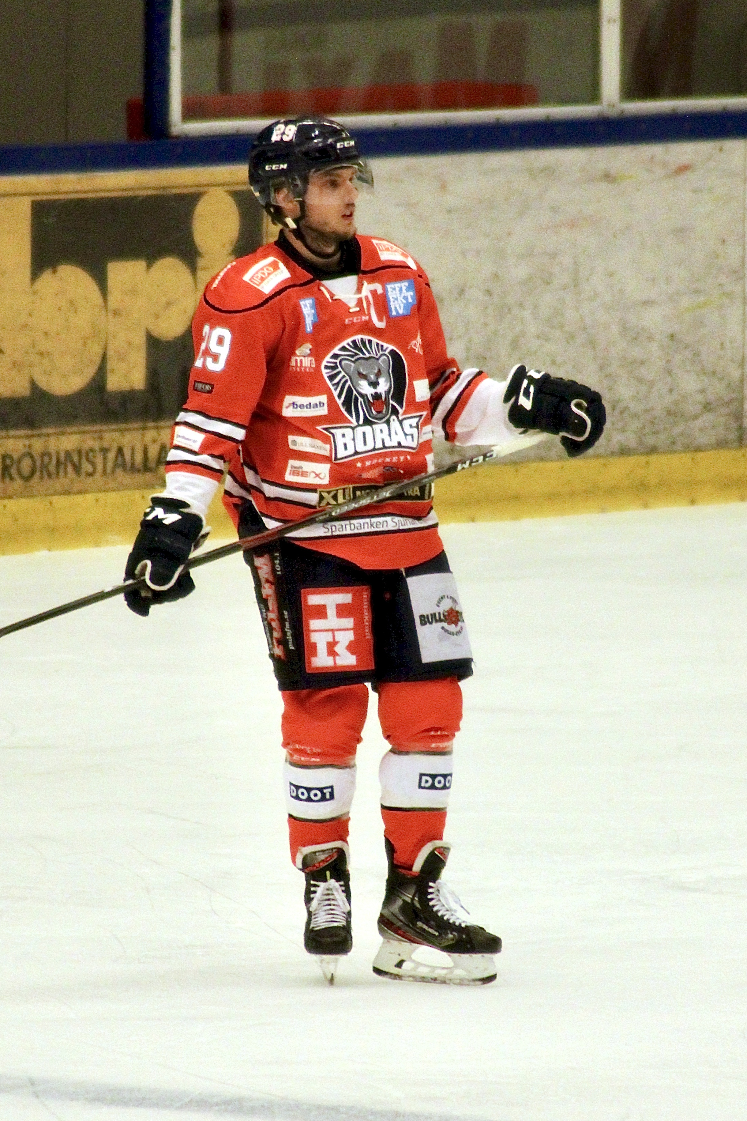 Henrik Eriksson i Borås Arena 6 november 2019. Match mellan Borås HC och Nybro Vikings IF.